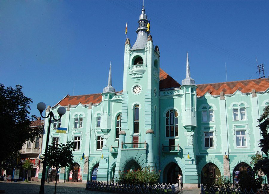 21-104-0028 Мукачівська ратуша (мур.) 1904-1910 рр. Мукачеве вул. Пушкіна, 2 48.441896, 22.71816 (G) 8-М А-місц.